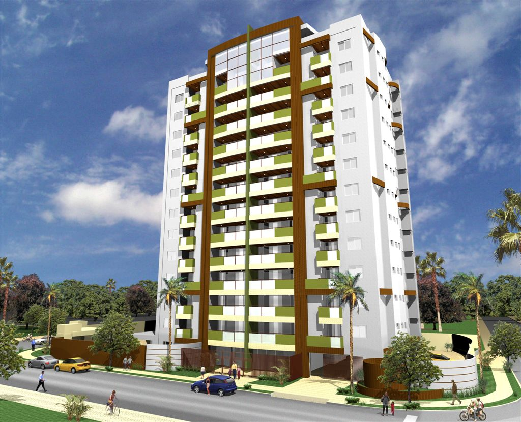 Eemplo de maquete eletrÃ´nica de EdifÃ­cio Alto